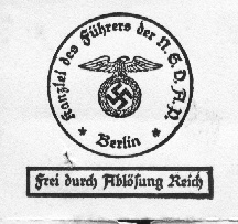 Stempel der Kanzlei des Führers der N.S.D.A.P. Berlin